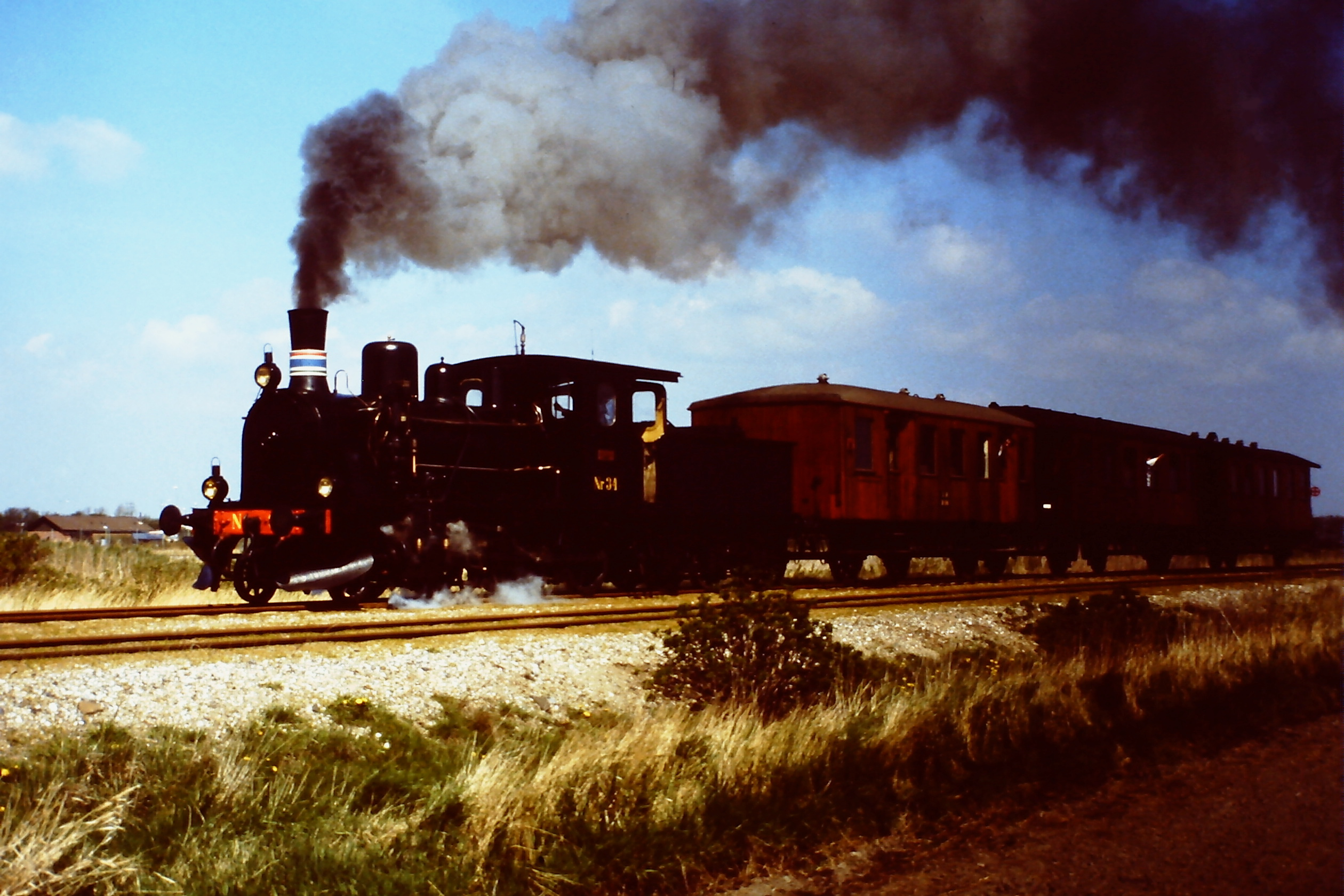 FFJ 34 mit historischem Zug